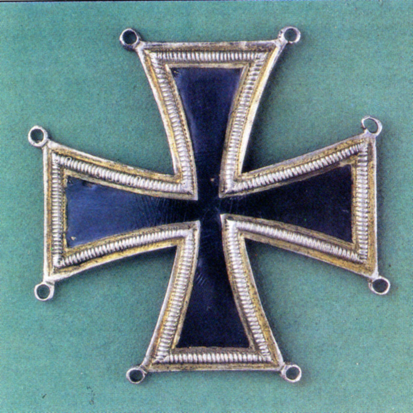 Солдатский Кульмский крест. Наградный прусский знак 1813 года. Продан на аукционе за 3 тыс.$. Железо, чернение, 13,51 гр. Размер 43х43 мм. Учрежден 4 декабря 1813 г. специально для награждения русских солдат за победу при Кульме. Прусский король Фридрих-Вильгельм III, бывший свидетелем мужества русских, в нарушение статута наградил их "Орденом Железного Креста". Но позднее поняв свою ошибку, был учрежден данный крест, повторяющий форму "Железного креста" I ст., но без даты, королевских вензелей и дубовых листьев. Солдатских знаков было прислано 11120 шт., и их вручили 27 августа 1816 г. на параде в честь трехлетия Кульмской победы. Данный знак относится именно к этим крестам.